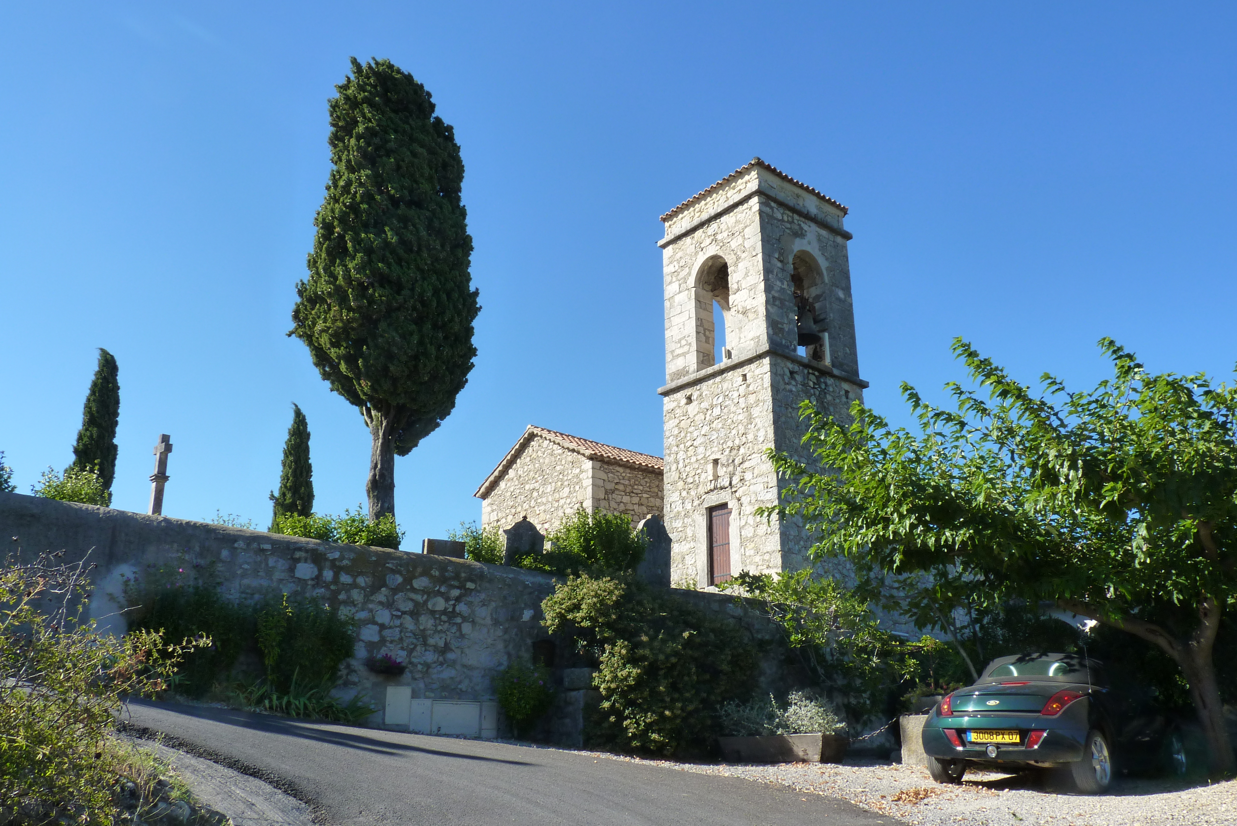 L'église du village de Sampzon (Ardèche)